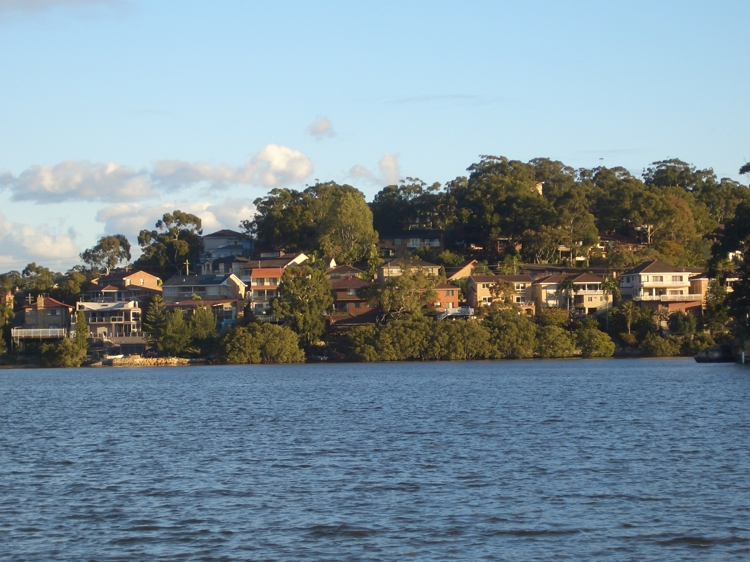 Kareela, Georges River